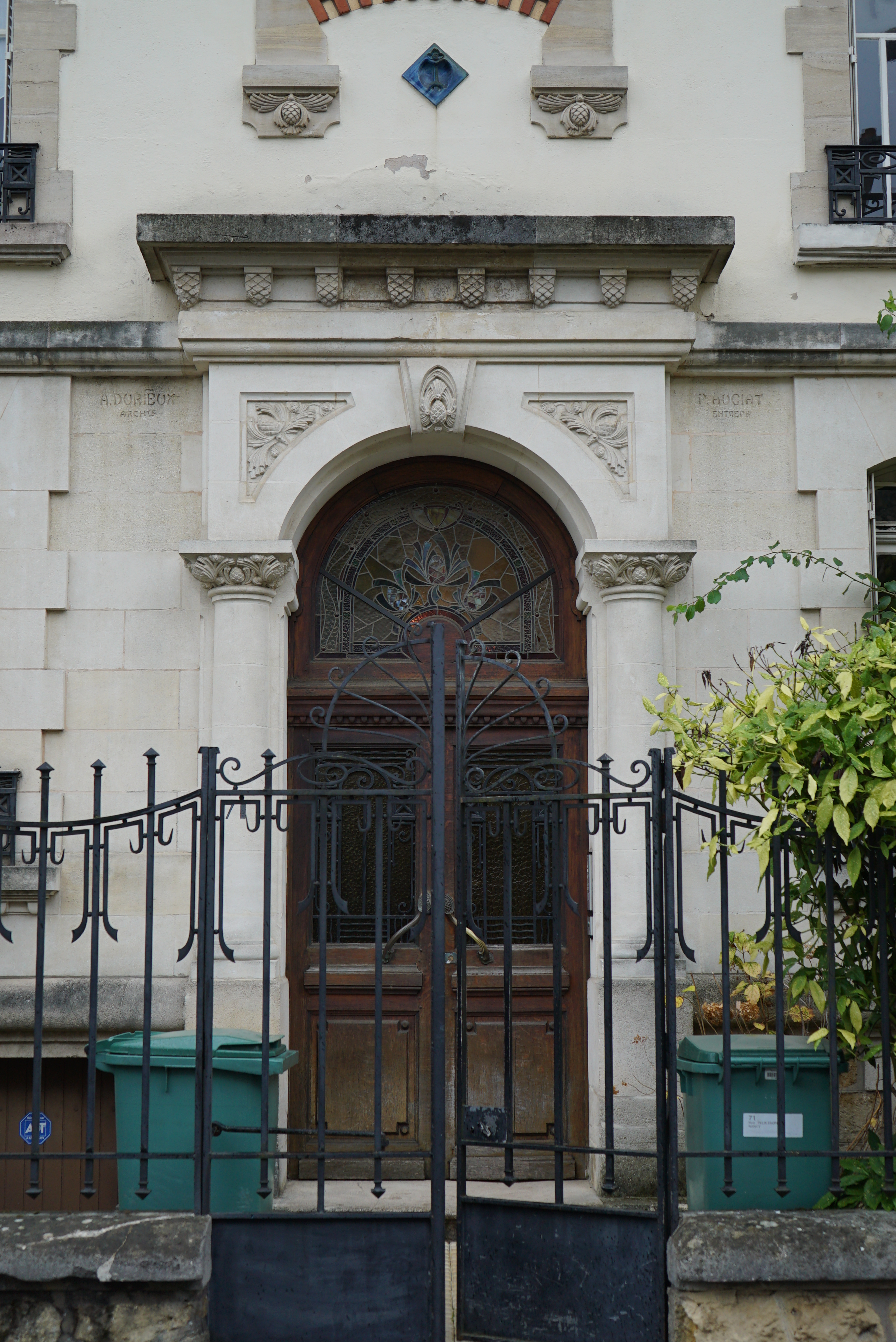 de la rue Félix Faure de nancy.